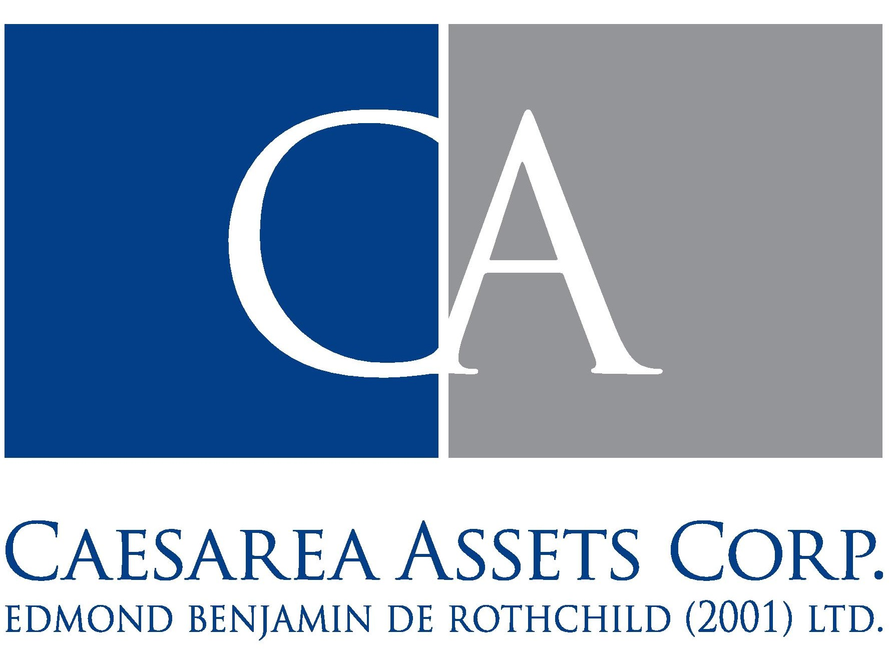 לוגו של החברה לנכסי קיסריה